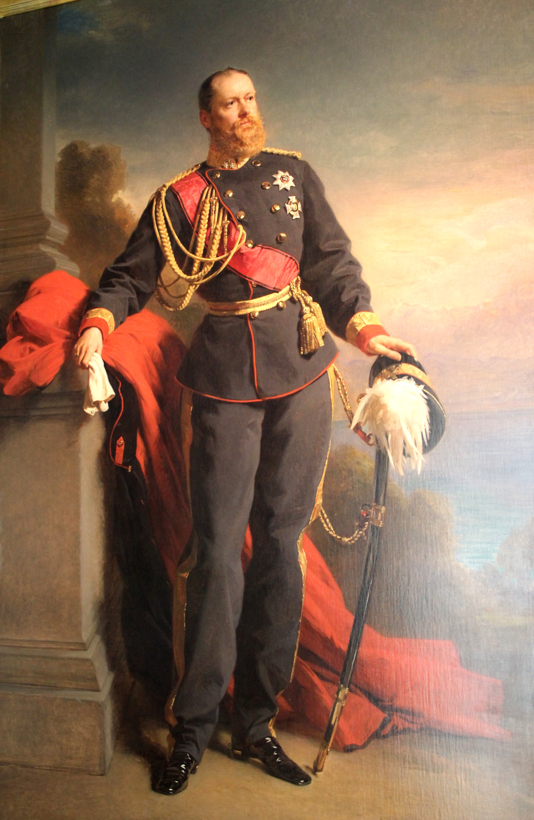 Karl von Württemberg (1823-1891)